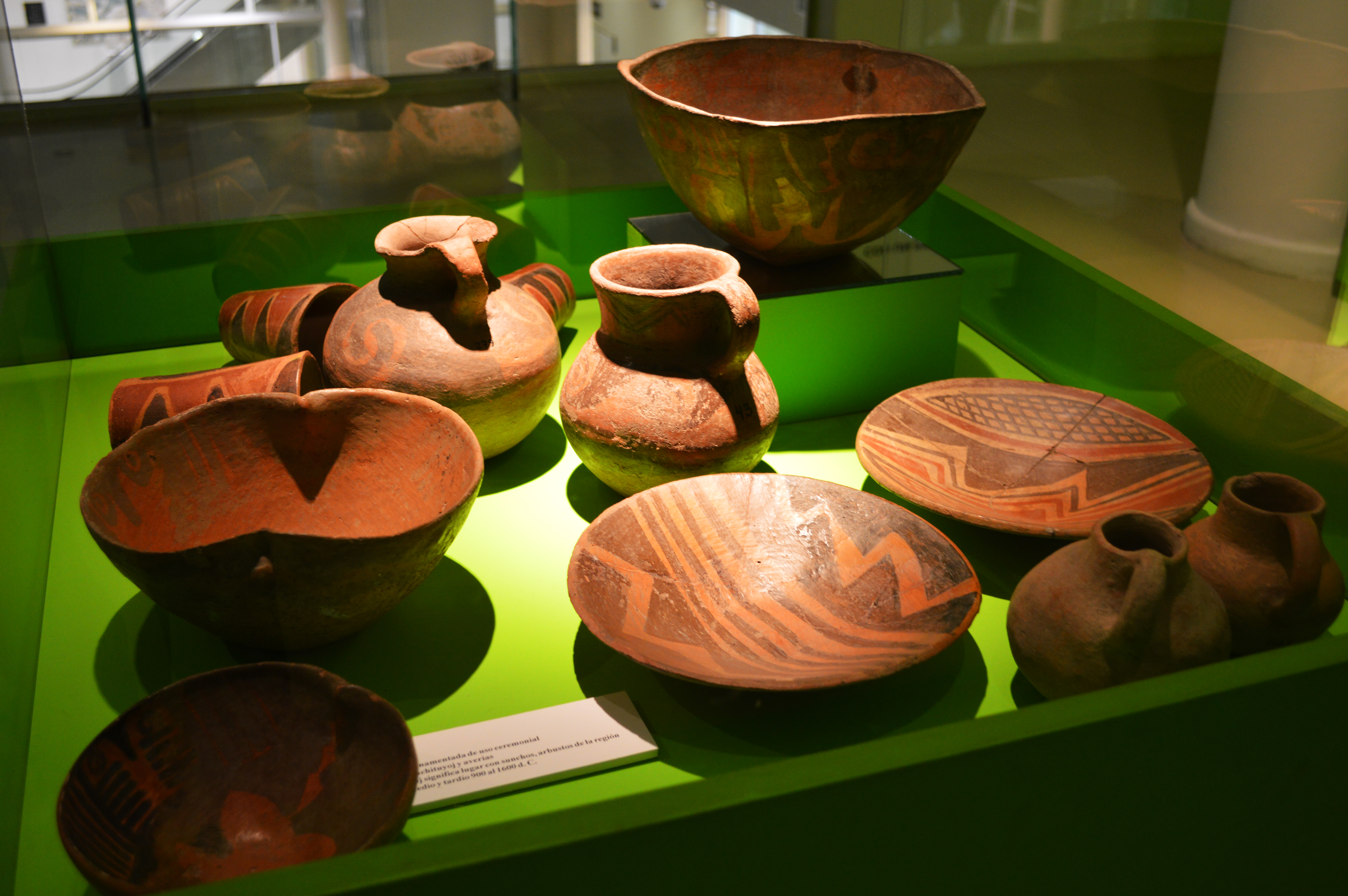 Alfarería indígena